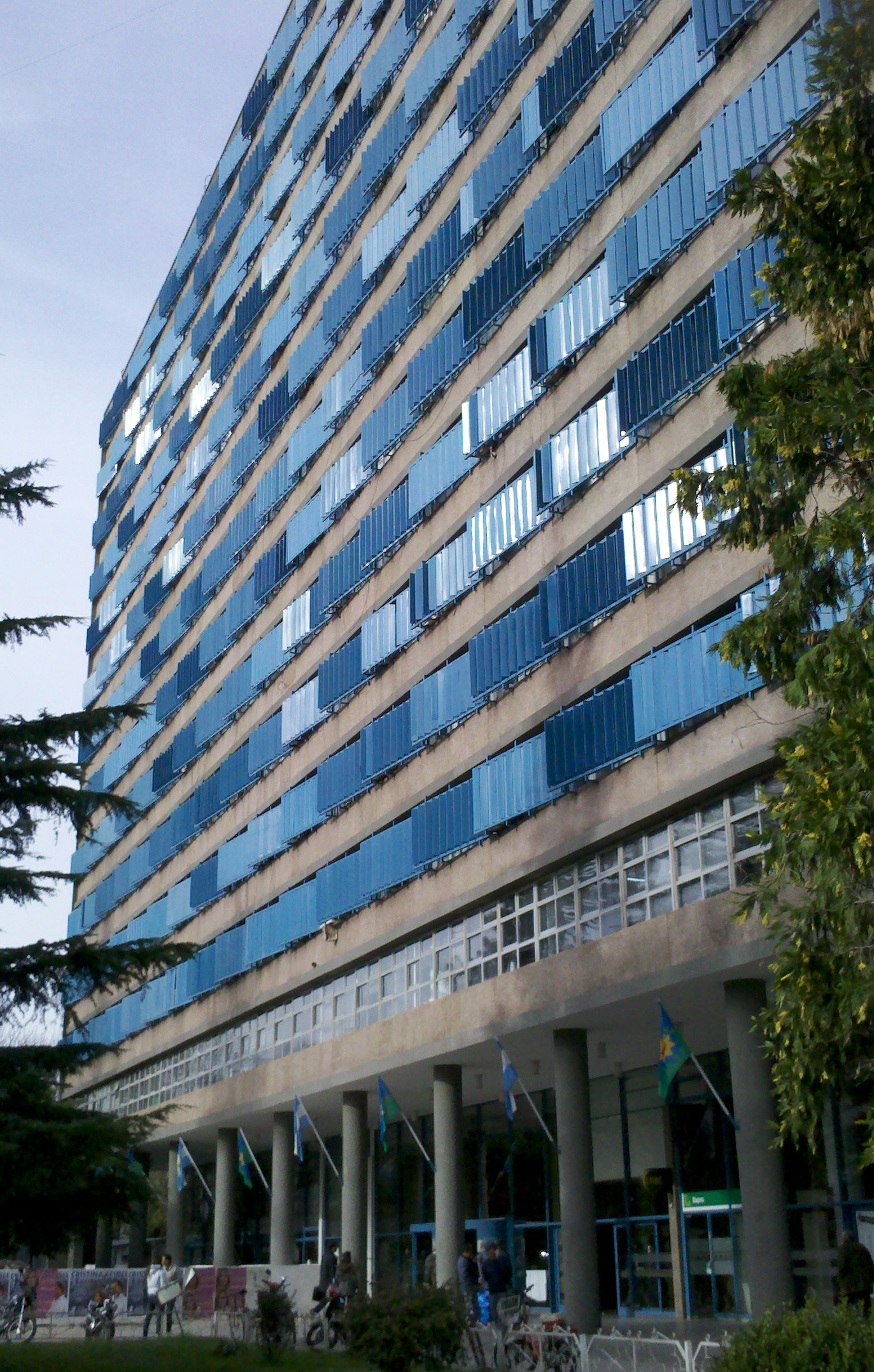 Fachada del edificio del Ministerio de Infraestructura de la provincia de Buenos Aires.